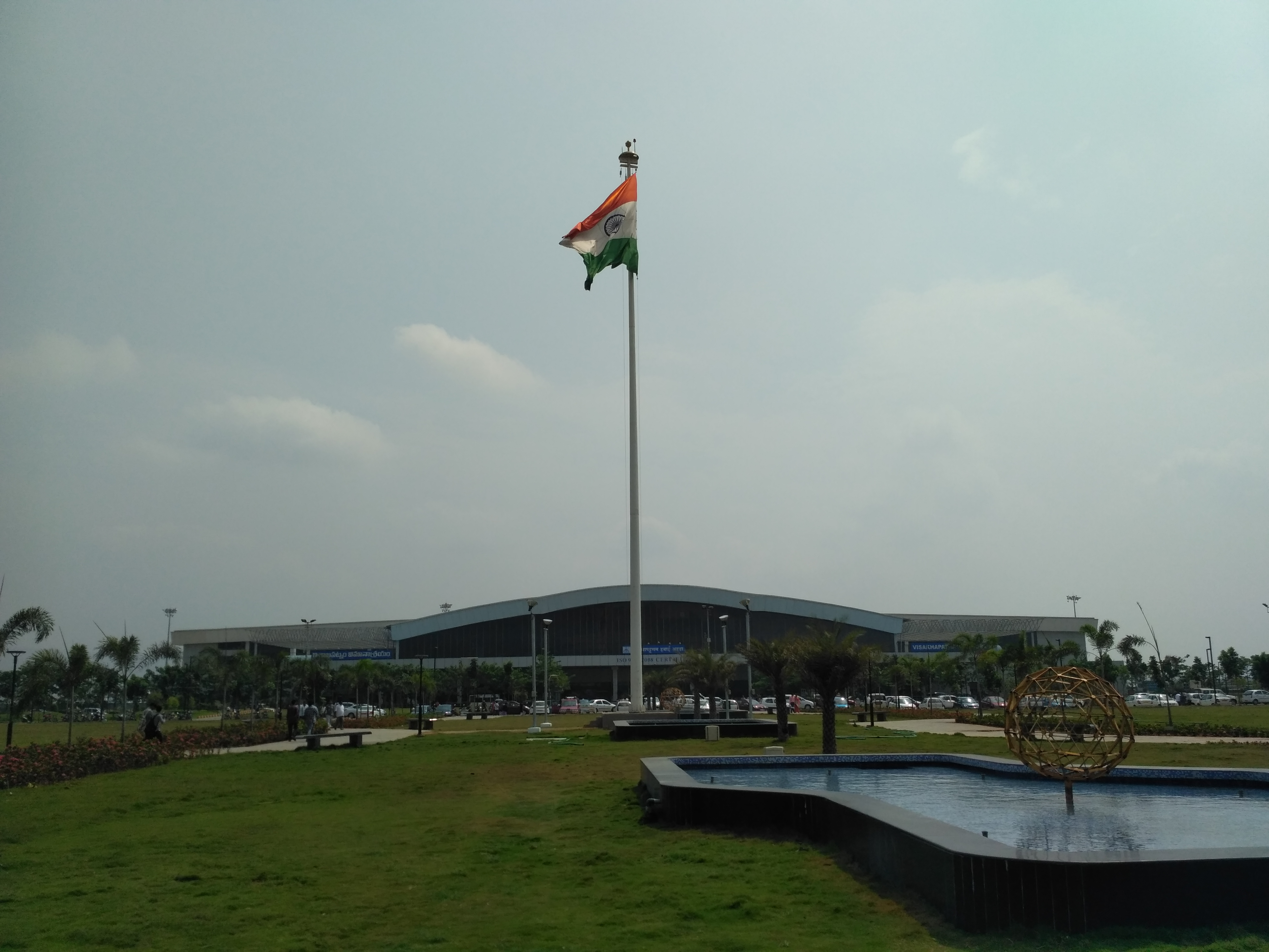 Visakhapatnam International Airport